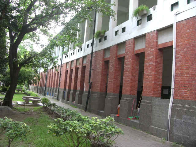 高雄中學三棟